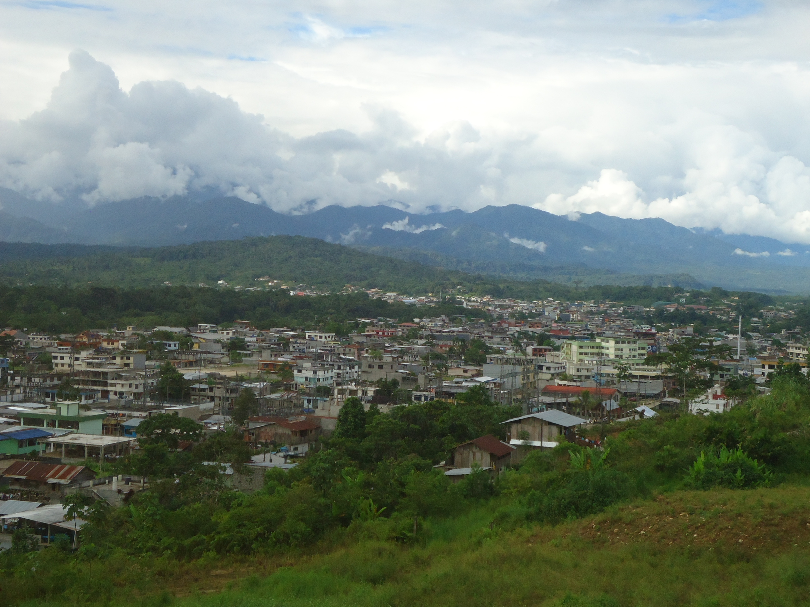 Vista panorámica de Tena